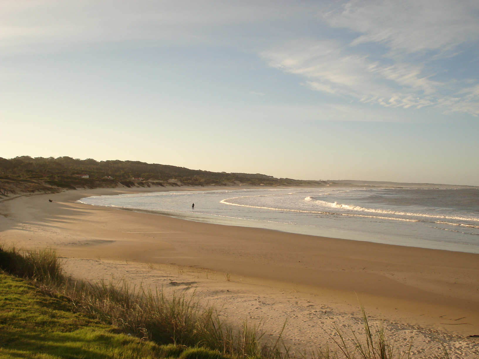 Parque de Santa Tereza, Uruguay.